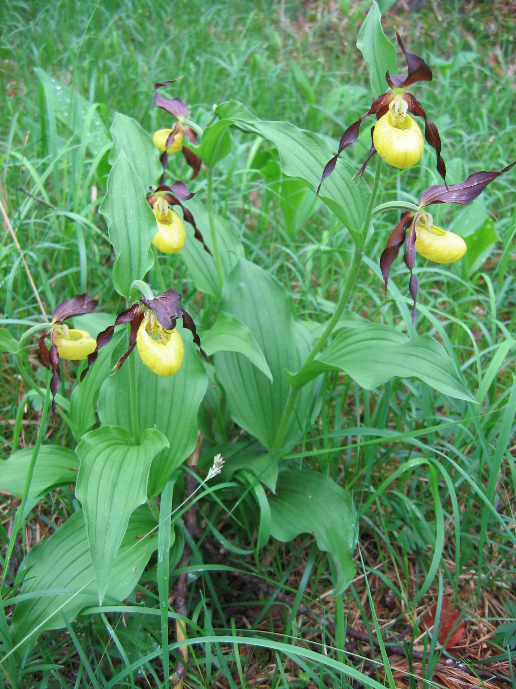 Gelber Frauenschuh Cypripedium calceolus, zweiblütiger Trieb rechts